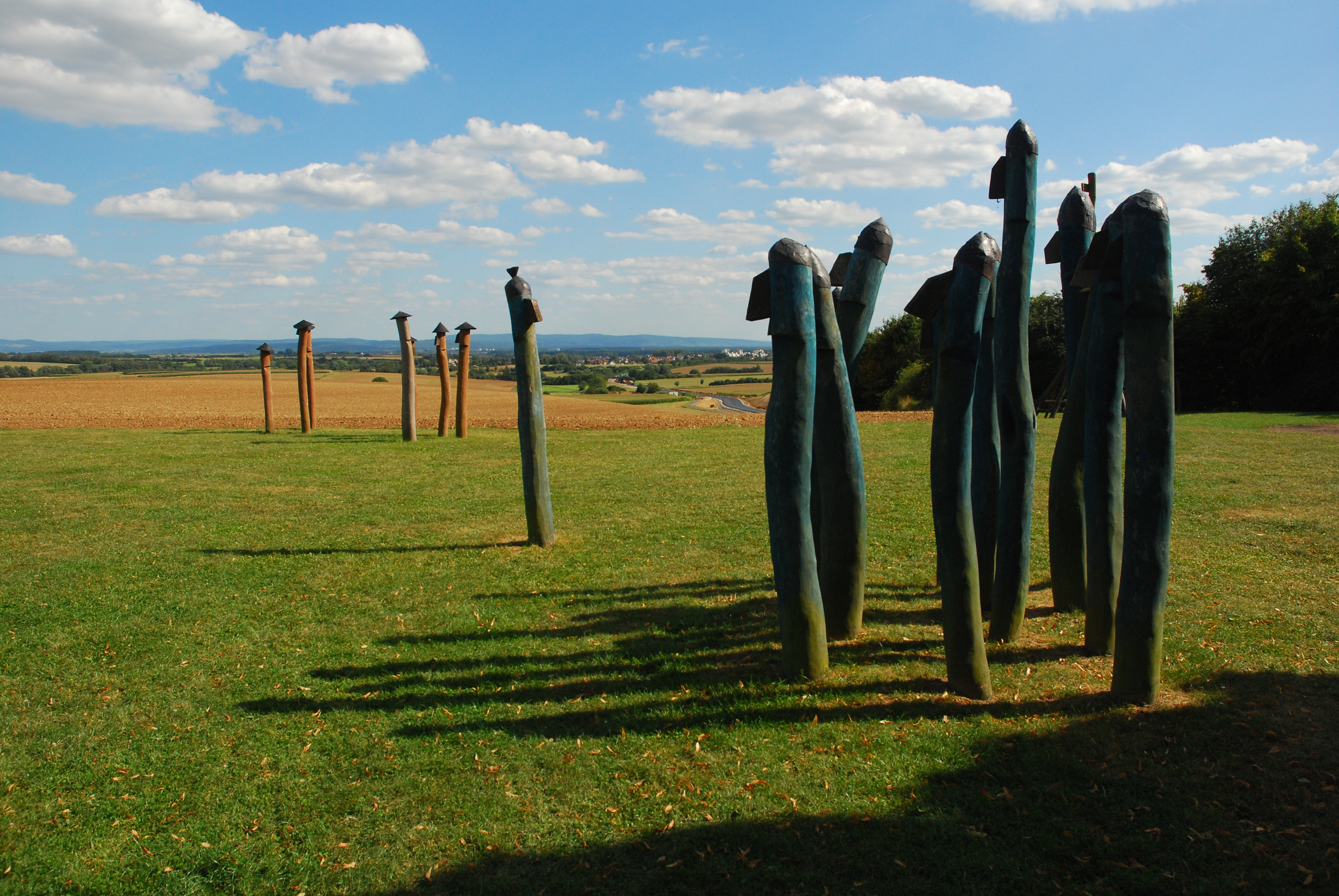 Stelen am Wartbaum bei Nidderau-Windecken